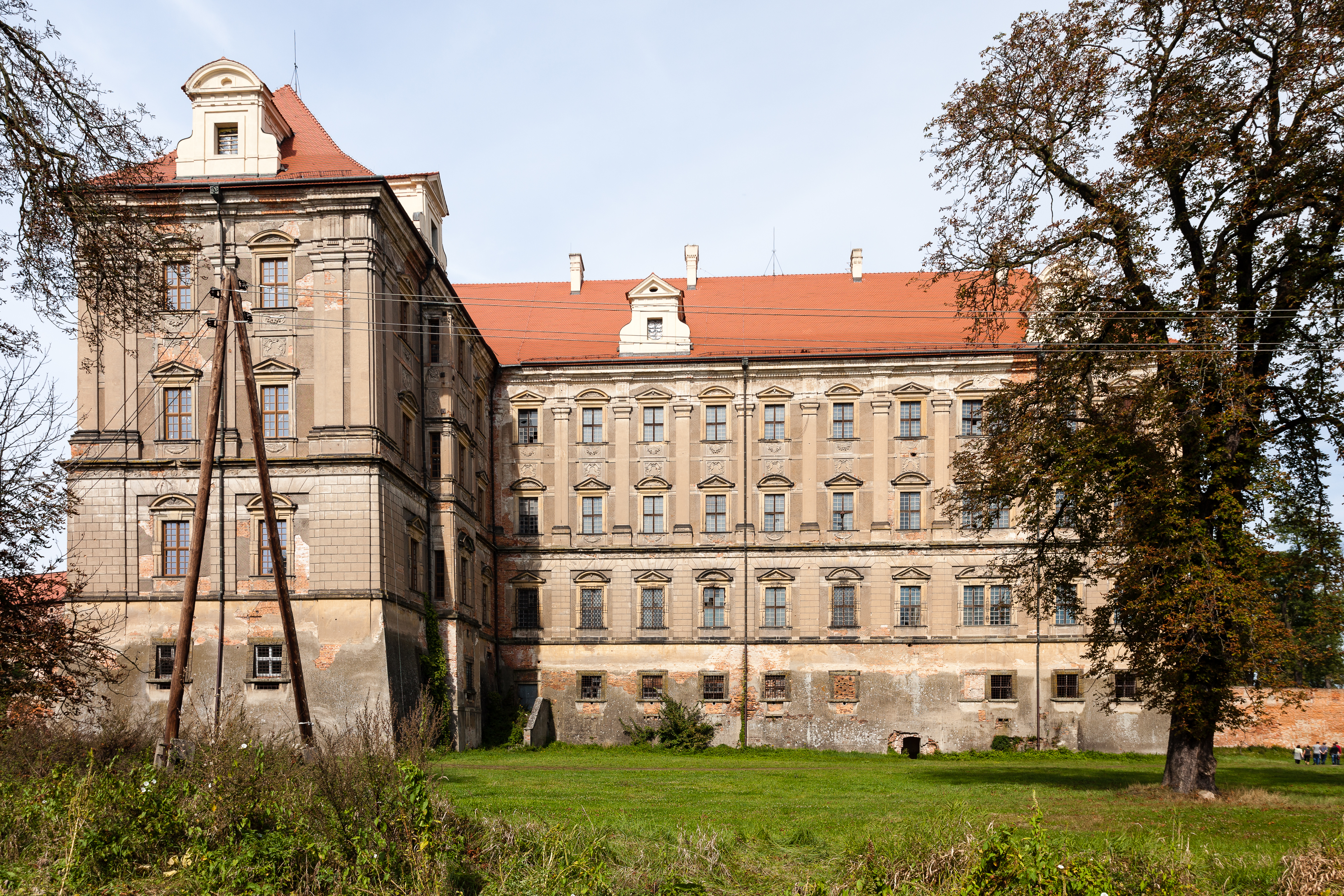 Lubiąż, Pl. Klasztorny - zespół klasztorny cystersów: (zabytek nr A/2755/616/W z 10-05.1988)